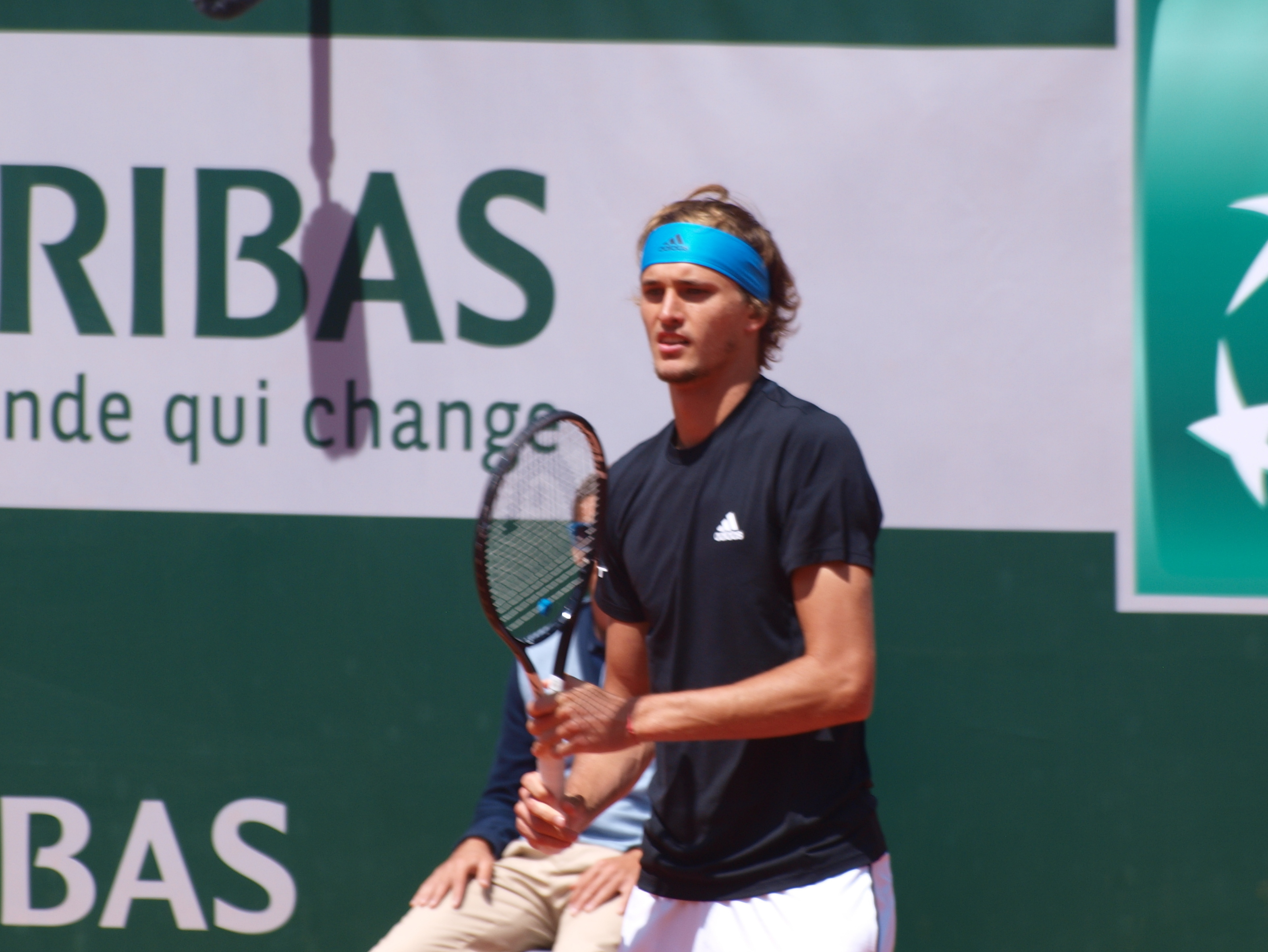 Internationnaux de France de Tennis 2019, au stade Roland Garros de Paris (France), sur le court Philippe-Chatrier rénové; huitième de finale simple-hommes entre N. Djocovic & A. Zverev, le jeudi 6 juin 2019 -- là, il s'agit du joueur teuton Alexander ZVEREV